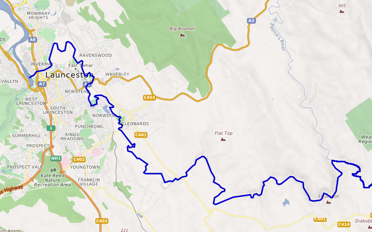 carte réalisée sur umap This map may be incomplete, and may contain errors. Don't rely solely on it for navigation.